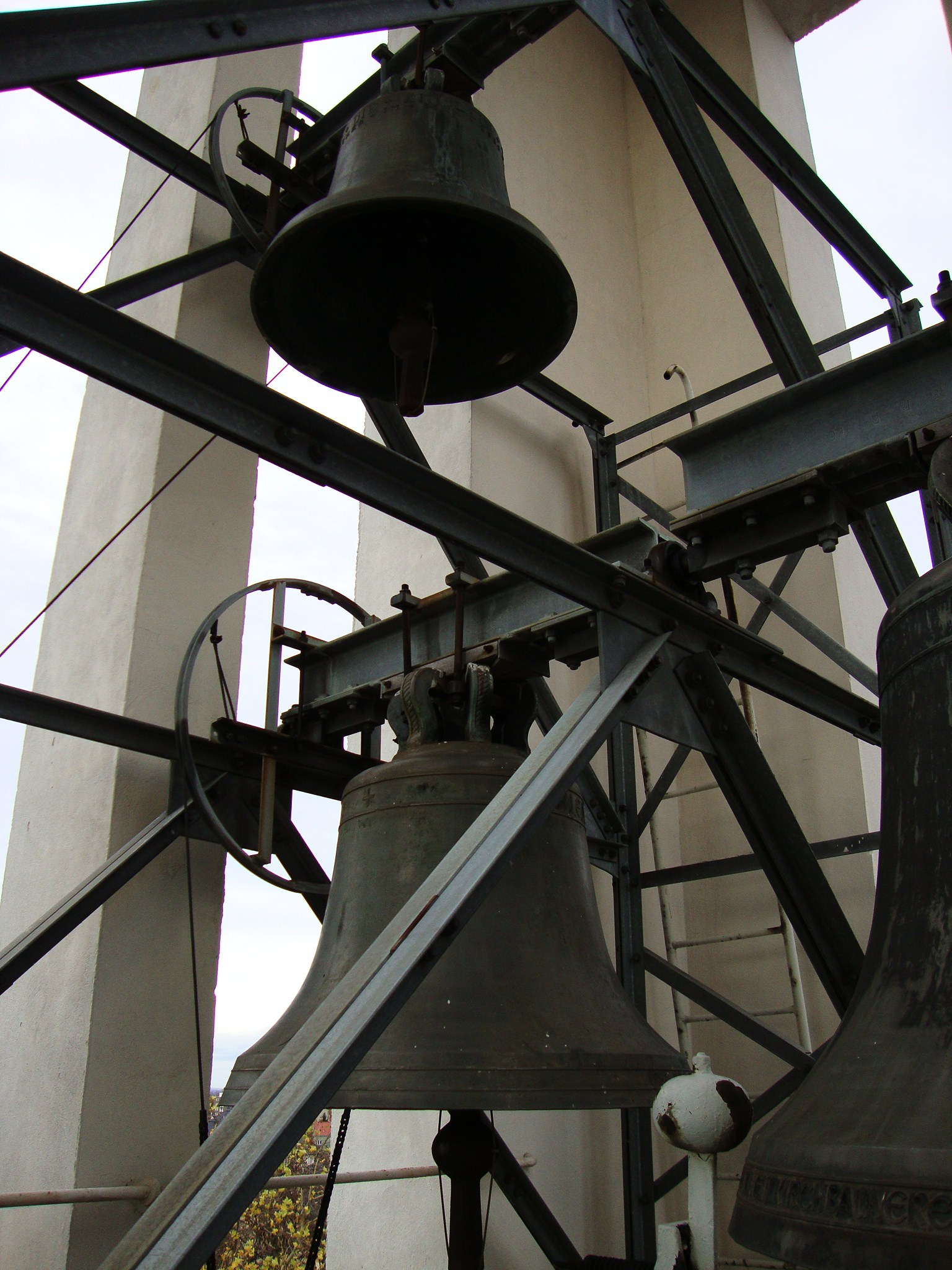 Köln-Zollstock, Melanchthonkirche: Blick in den Glockenstuhl. Links oben Glocke 3, darunter Glocke 2. Am rechten Bildrand Glocke 1.